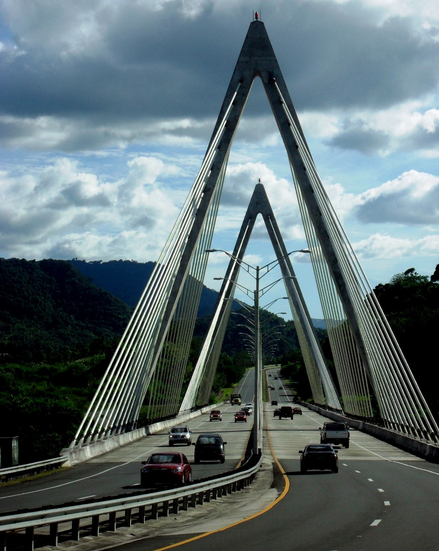 Puente Atirantado en Naranjito, Puerto Rico